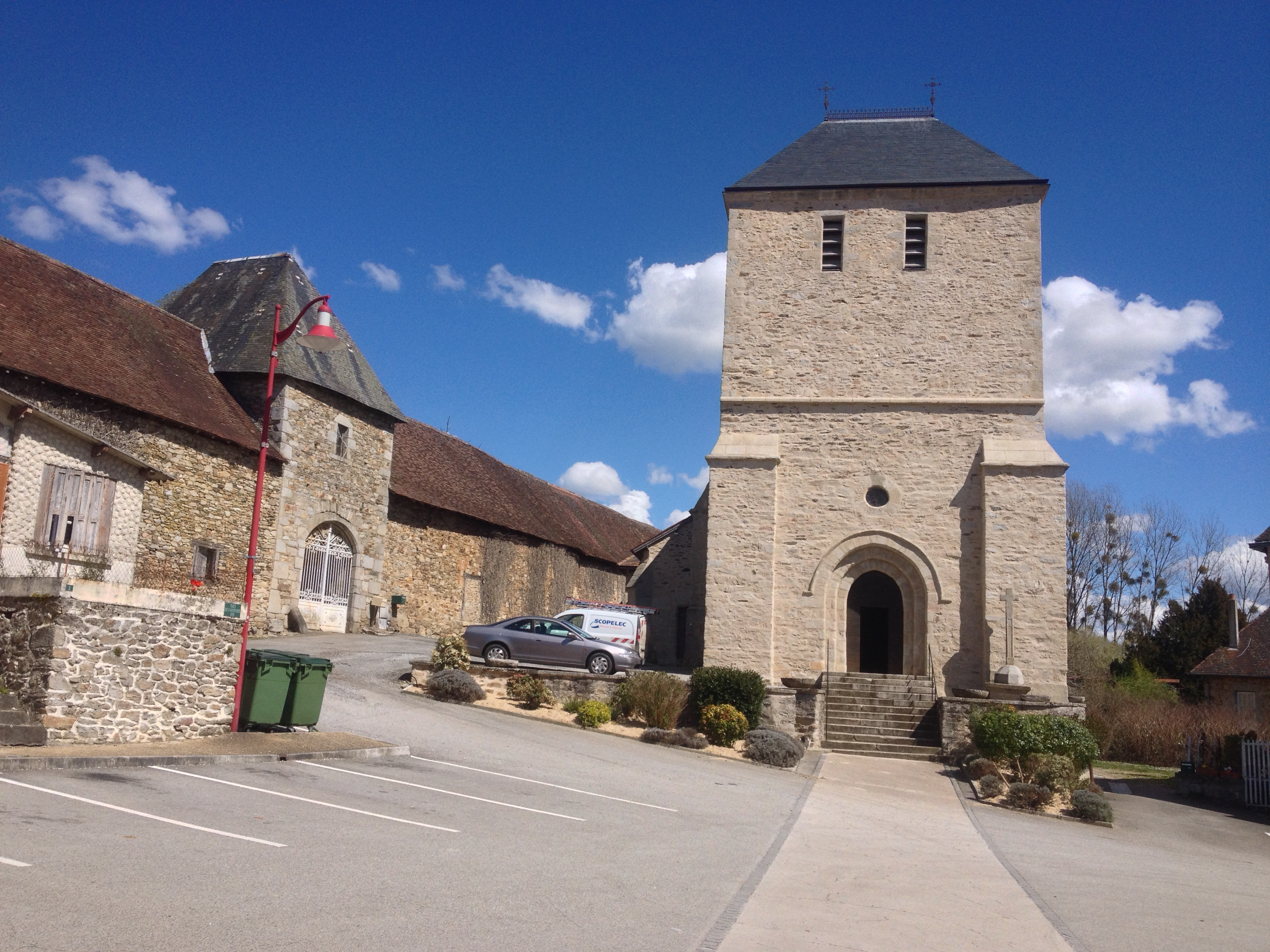 L'église Saint-Martin, place du 11 Novembre 1918, Linards.